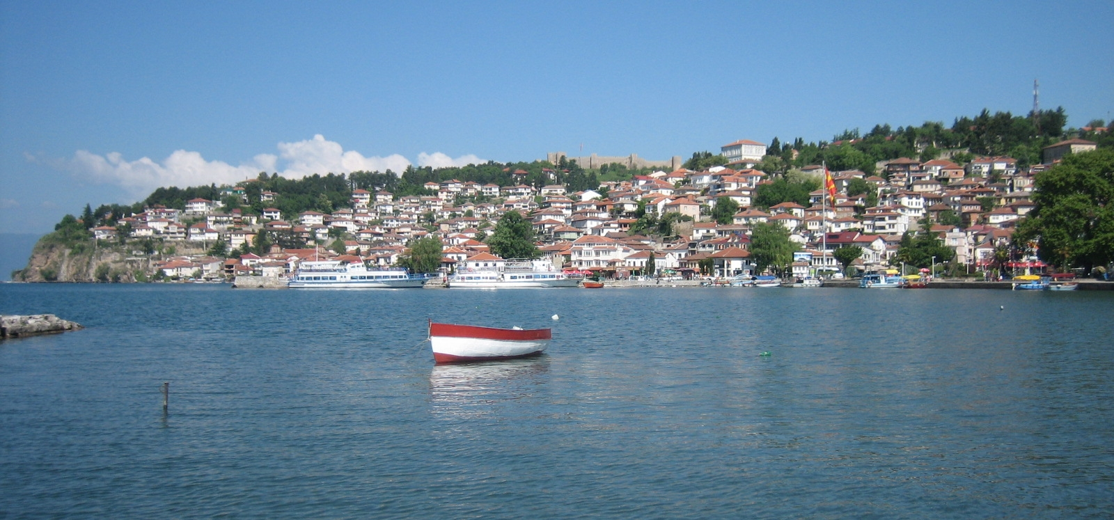 Ohrid, Macedonia